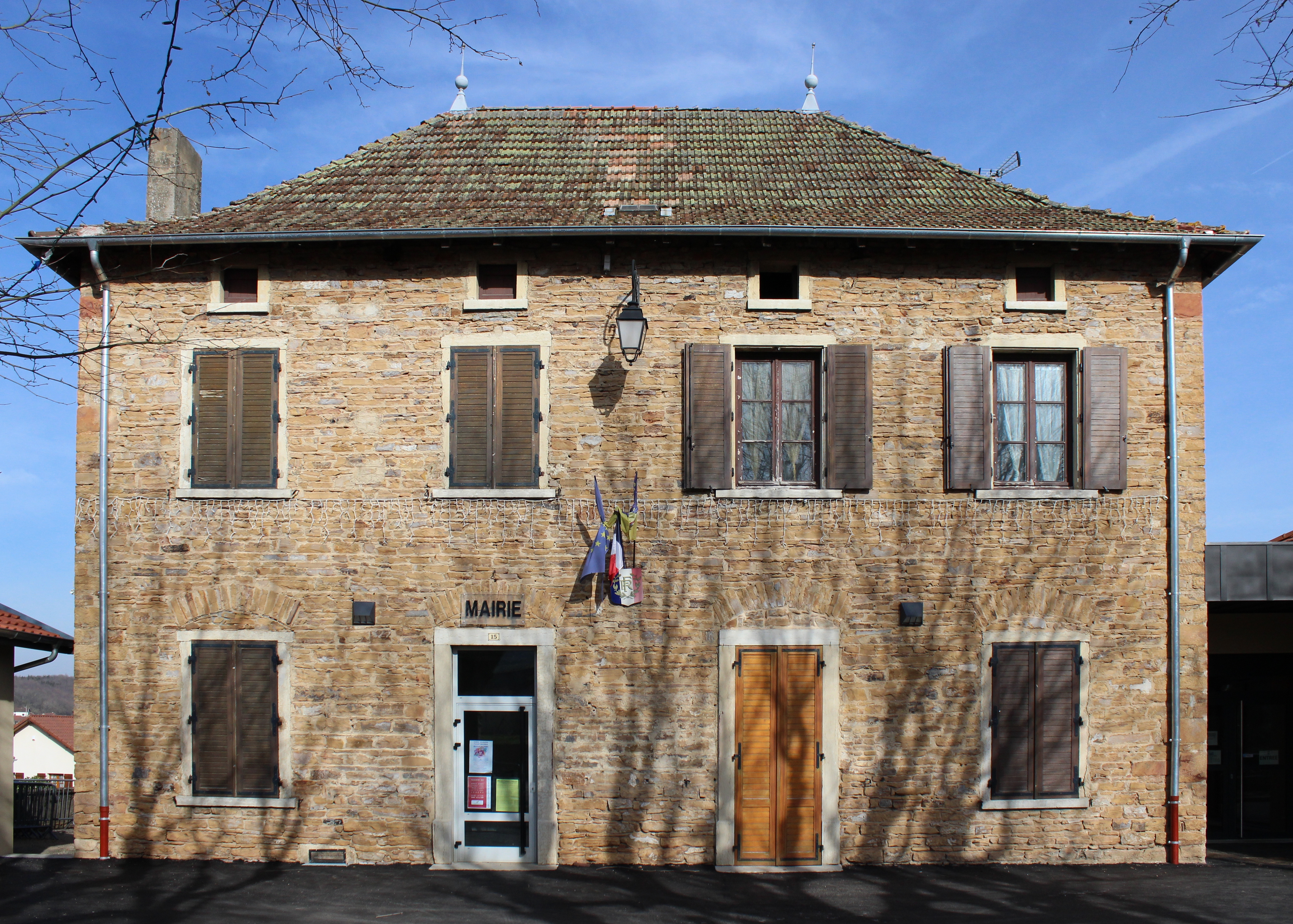 La mairie de Chozeau.